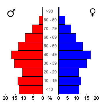 Age pyramids for the 443 municipalities in the Netherlands. Data 2007. Statistics provided by Centraal Bureau voor de Statistiek, Voorburg/Heerlen. Source: Tabel: Bevolking Nederland per gemeente en diverse regio's naar leeftijd, geslacht en burgerlijke staat, 1 januari 1988-2007. Gewijzigd op 24 mei 2007 (on-line database StatLine) Bevolkingspiramide - Gemeente Purmerend (2007).png